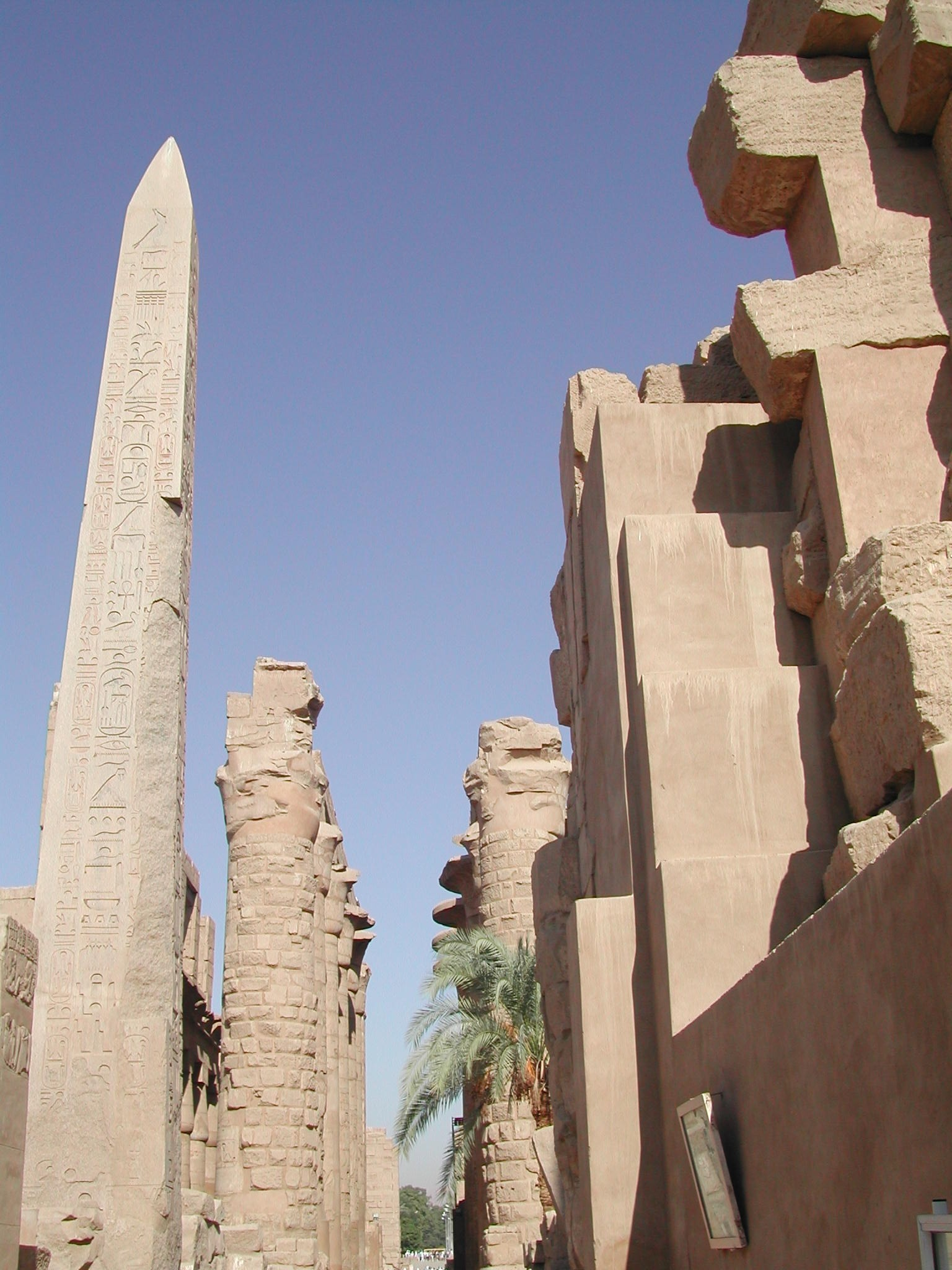 Egypten - Haapttempel vum Amun zu Karnak.